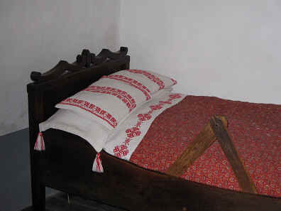 Quelle: eigene Aufnahme 19 08 2005